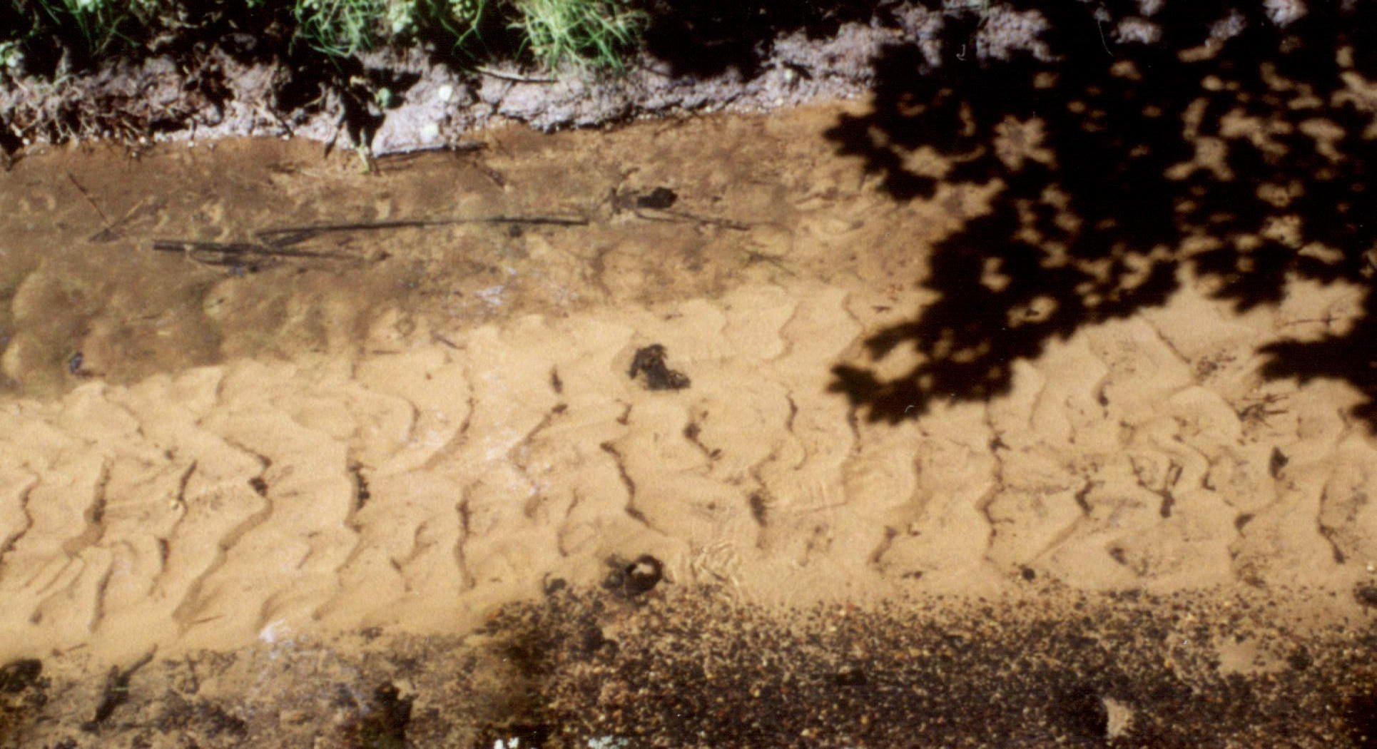 riplemarki na dnie rzeki - przykład akumulacji rzecznej